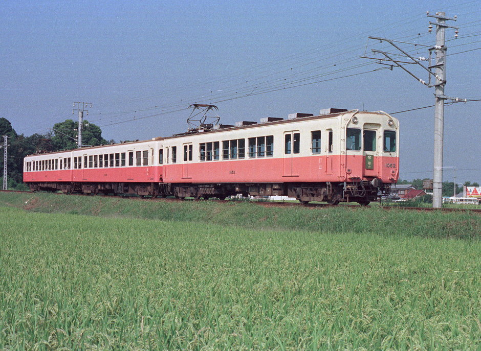 高松琴平電鉄 1062+1016+1015